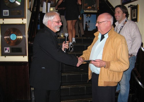 Paul de Kievit overhandigt Endless Wire aan Freddy Haayen (rechts). Foto genomen met het toestel van Paul de Kievit, geplaatst met toestemming van Paul de Kievit.